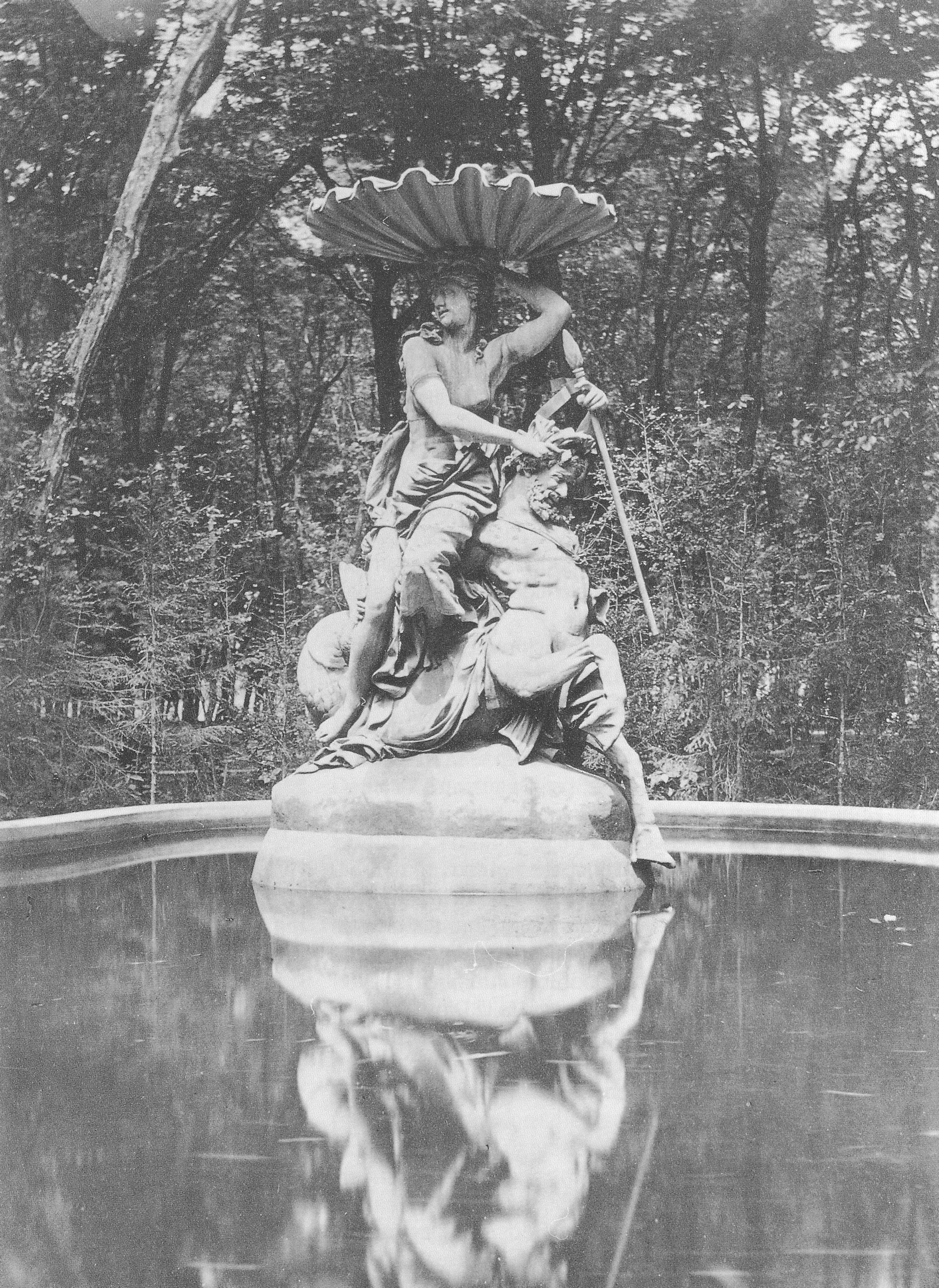 Figuren am Galatea-Brunnen